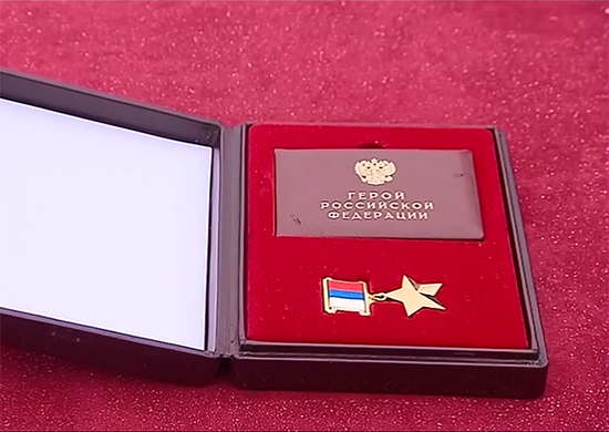 Медаль «Золотая Звезда» и удостоверение к награде Героя Российской Федерации подполковника Олега Анатольевича Пешкова